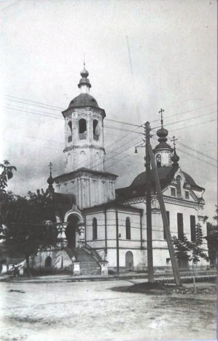 Храм Илии Пророка